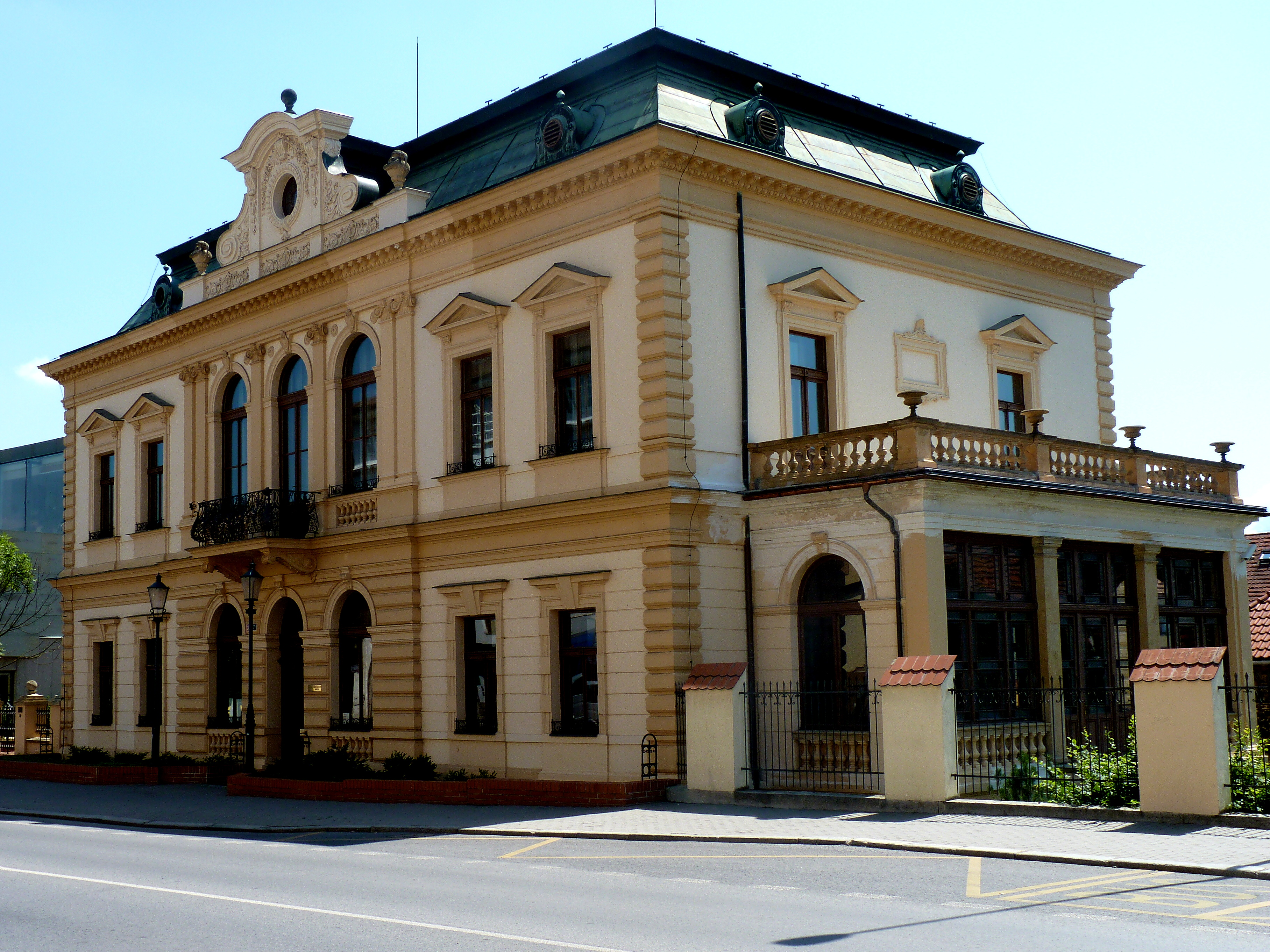 Vila Dusilova (Beroun), třída Politických vězňů 203/9, Beroun